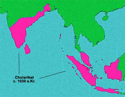 Indien, karta, Cholariket, egentillv.